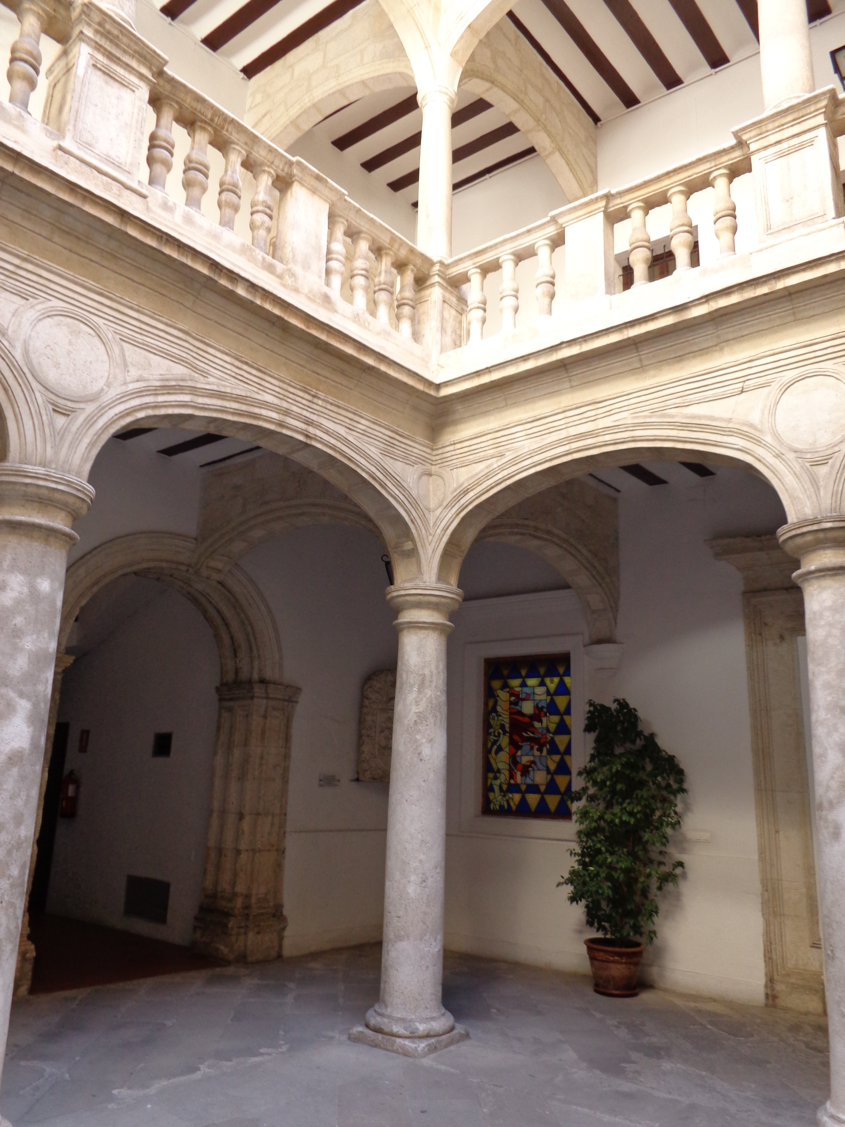 Municipio di Villena